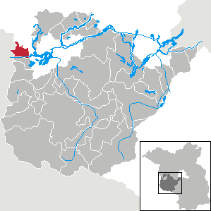 Bensdorf in Brandenburg (Country) - District Potsdam-Mittelmark